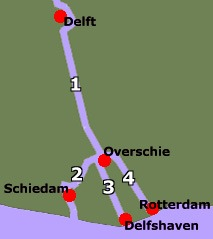 1 Delftse Schie 2 Schiedamse Schie 3 Delfshavense Schie 4 Rotterdamse Schie (thans grotendeels gedempt)